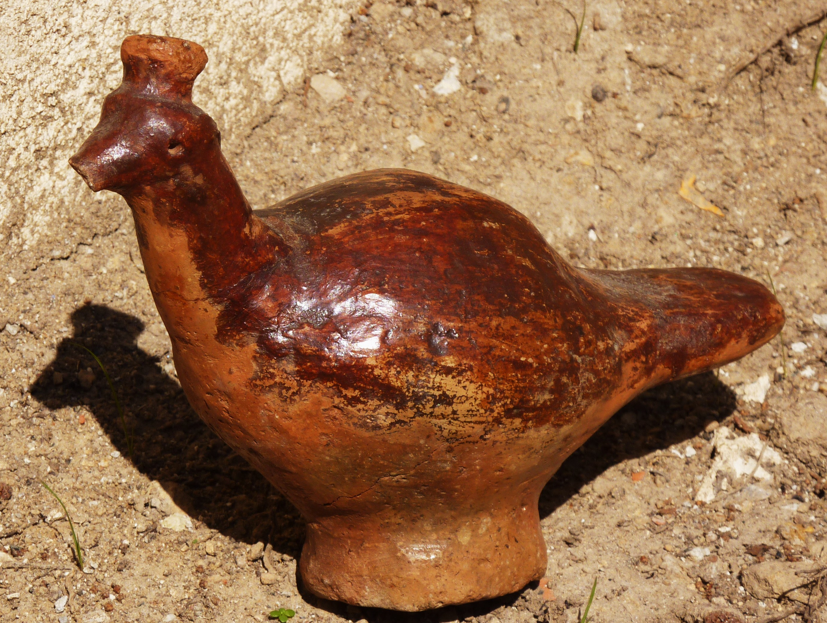 Oiseau, poterie des Aurès (Algérie) [Région de Djemina ?]